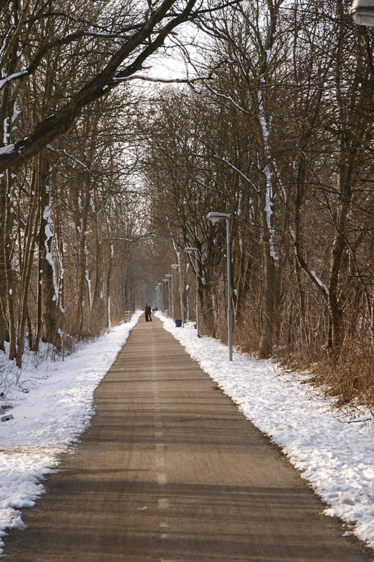 Hardebergaspåret genom Fågelsång